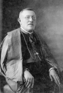 Dom Quintino Rodrigues de Oliveira e Silva 1º Bispo de Crato.